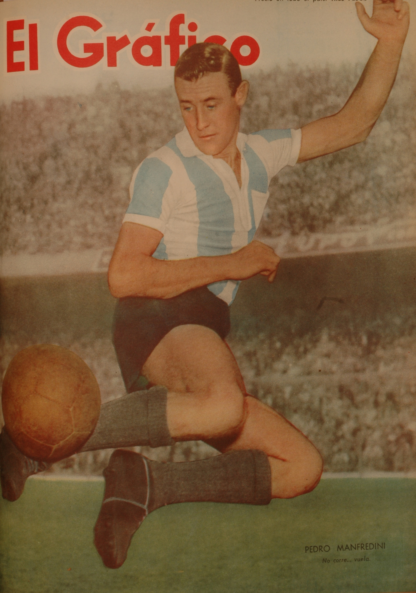 El Grafico del 13 de Noviembre de 1958. Edicion 2044